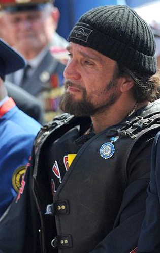 лидер всероссийского мотоклуба Александр Залдостанов в Волгограде